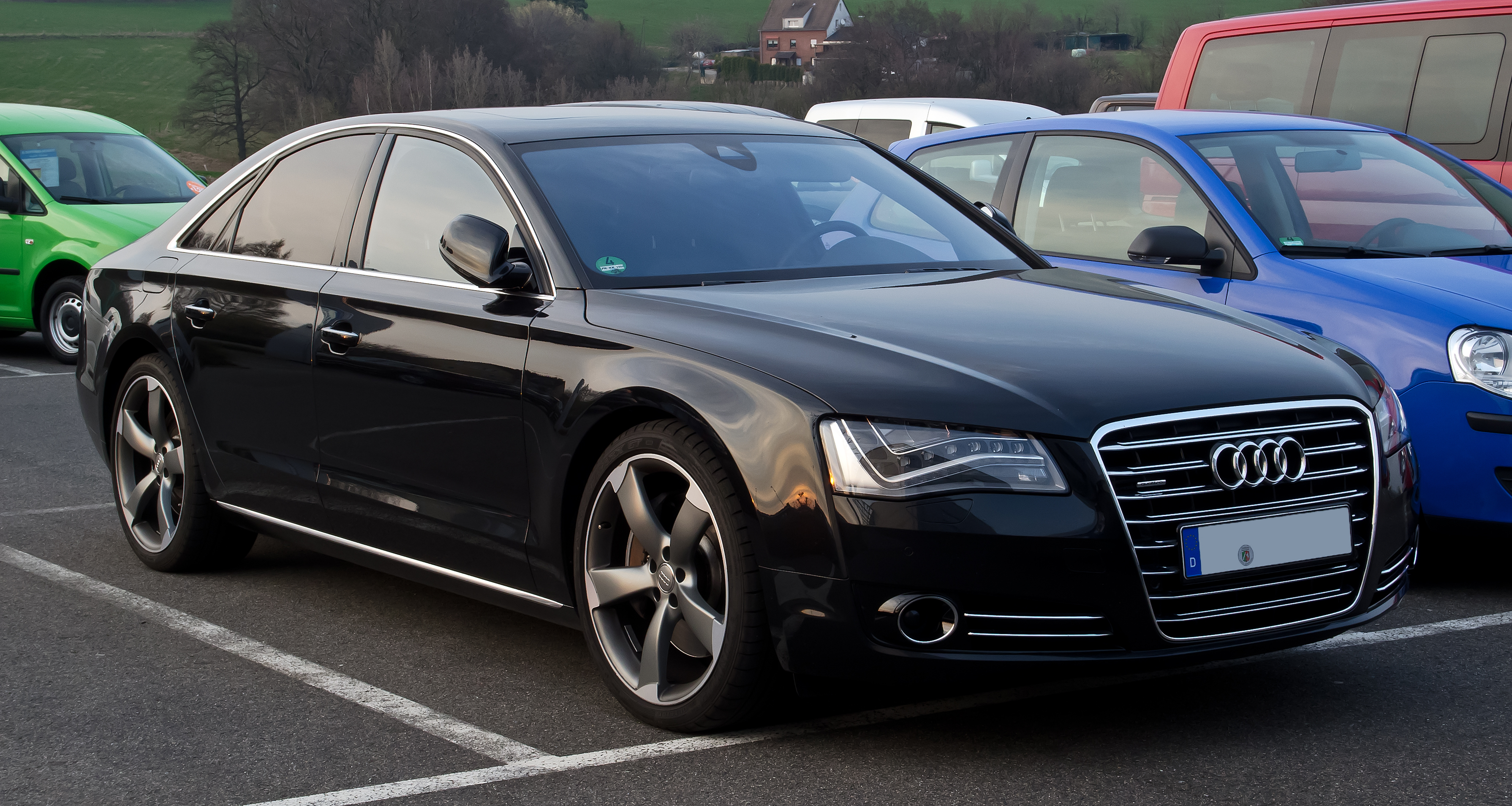 Audi A8 quattro (D4)